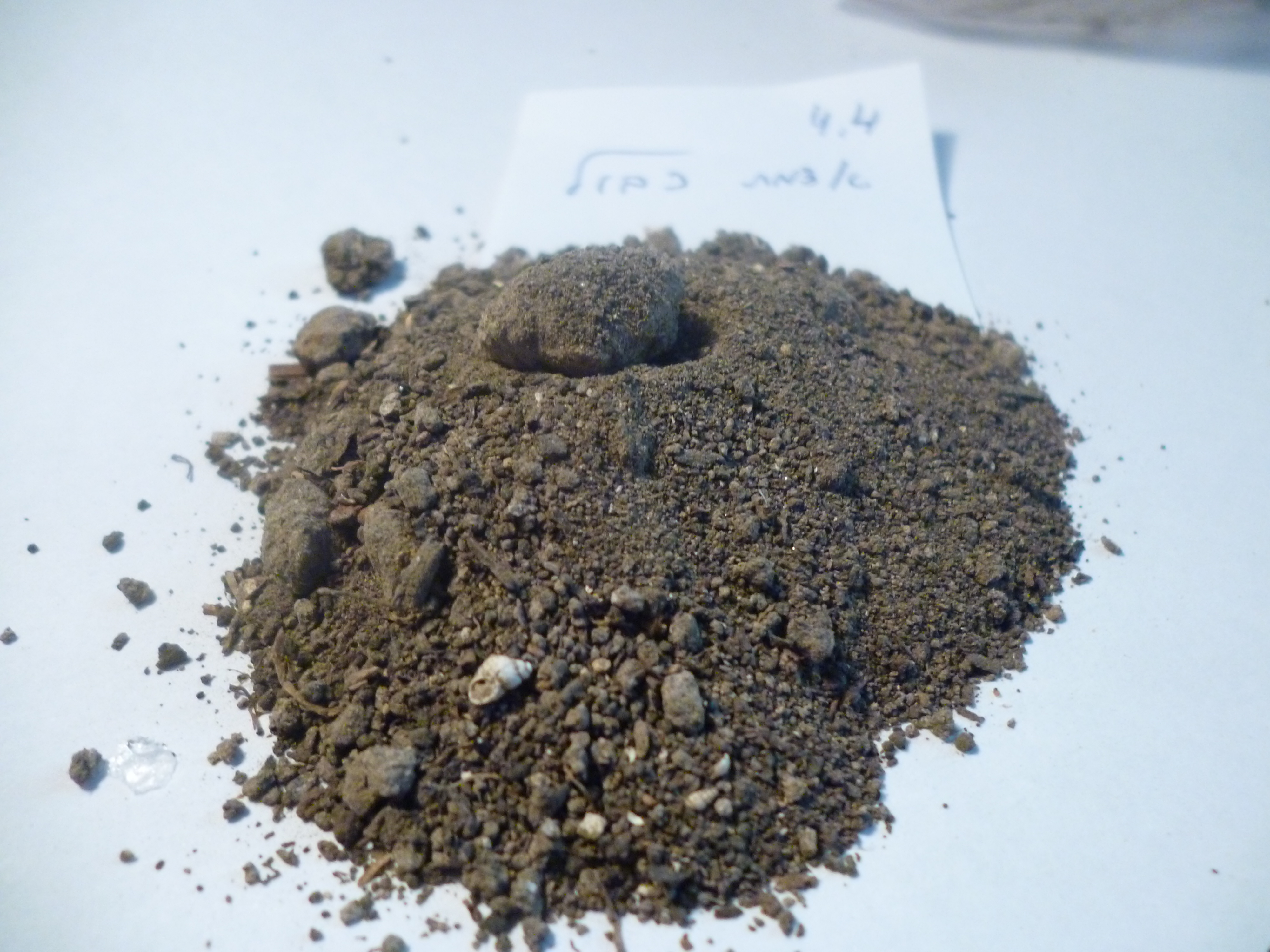 קרקע סחף